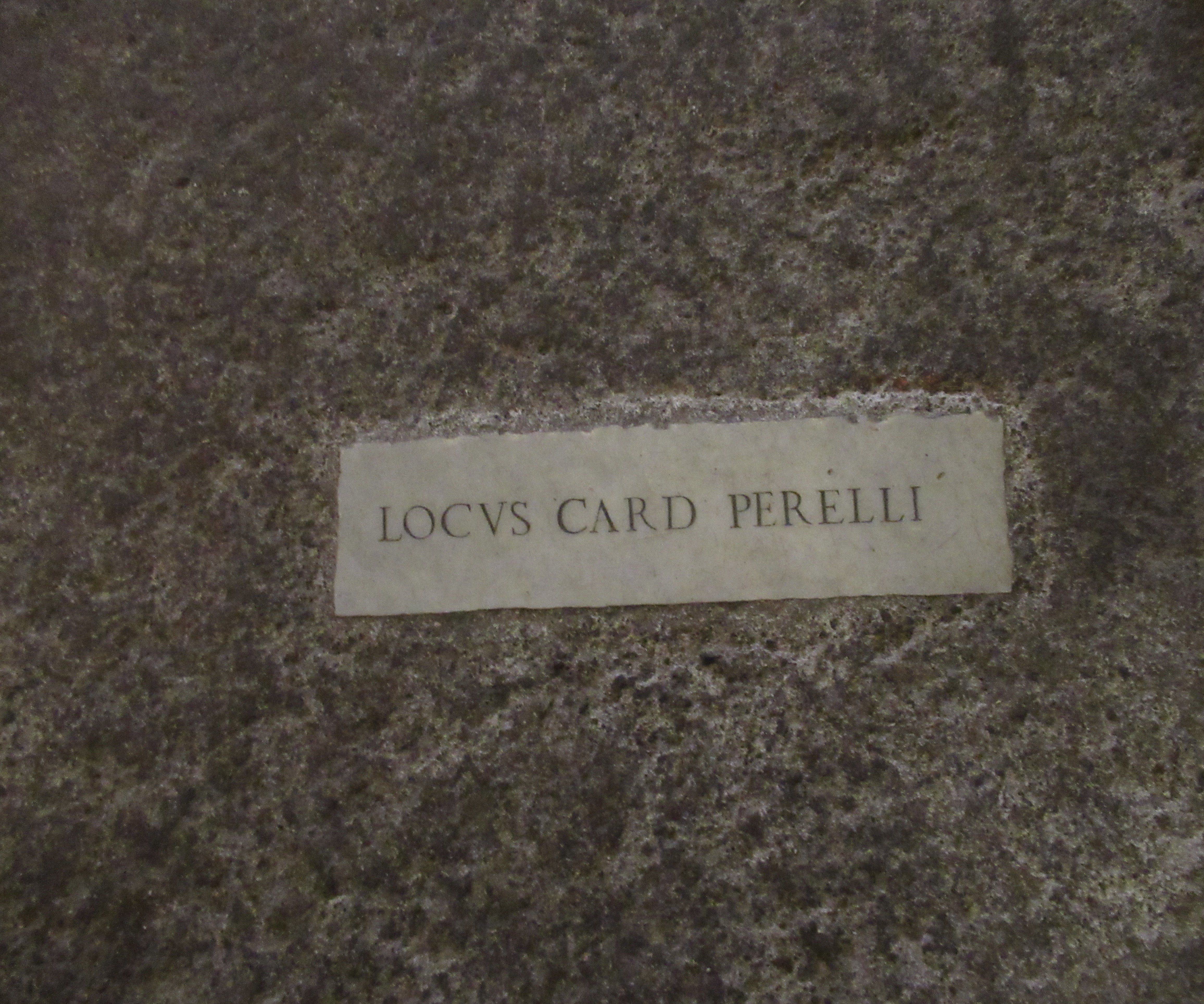 Sepoltura del cardinale Nicola Perrelli nella basilica dei Santi Giovanni e Paolo, Roma, oggi visitabile nelle Case romane al Celio